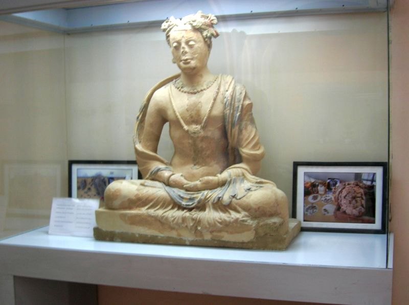 Statue in Kabul Museum